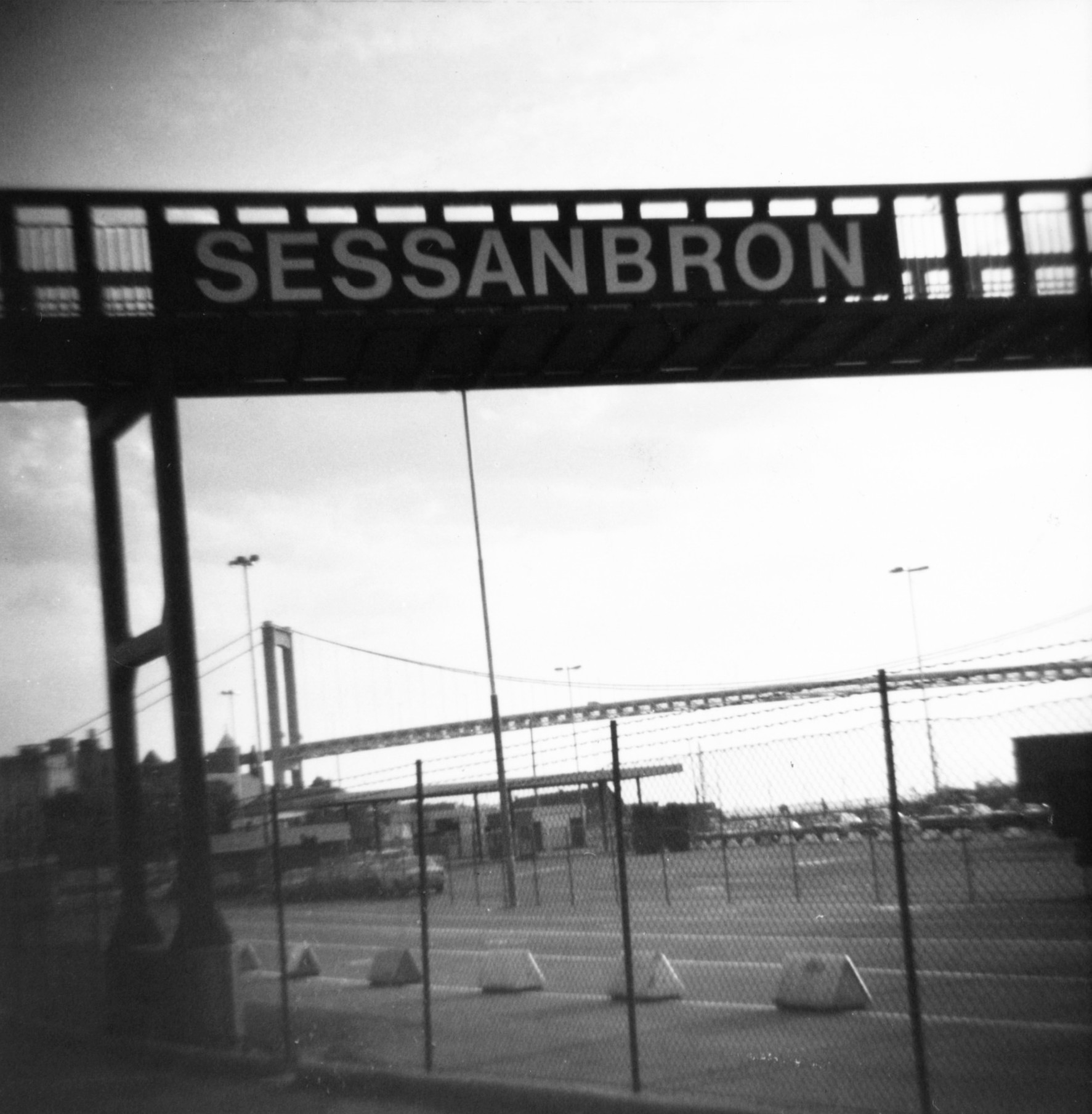 Sessanbron, Majnabbe (1975-76)